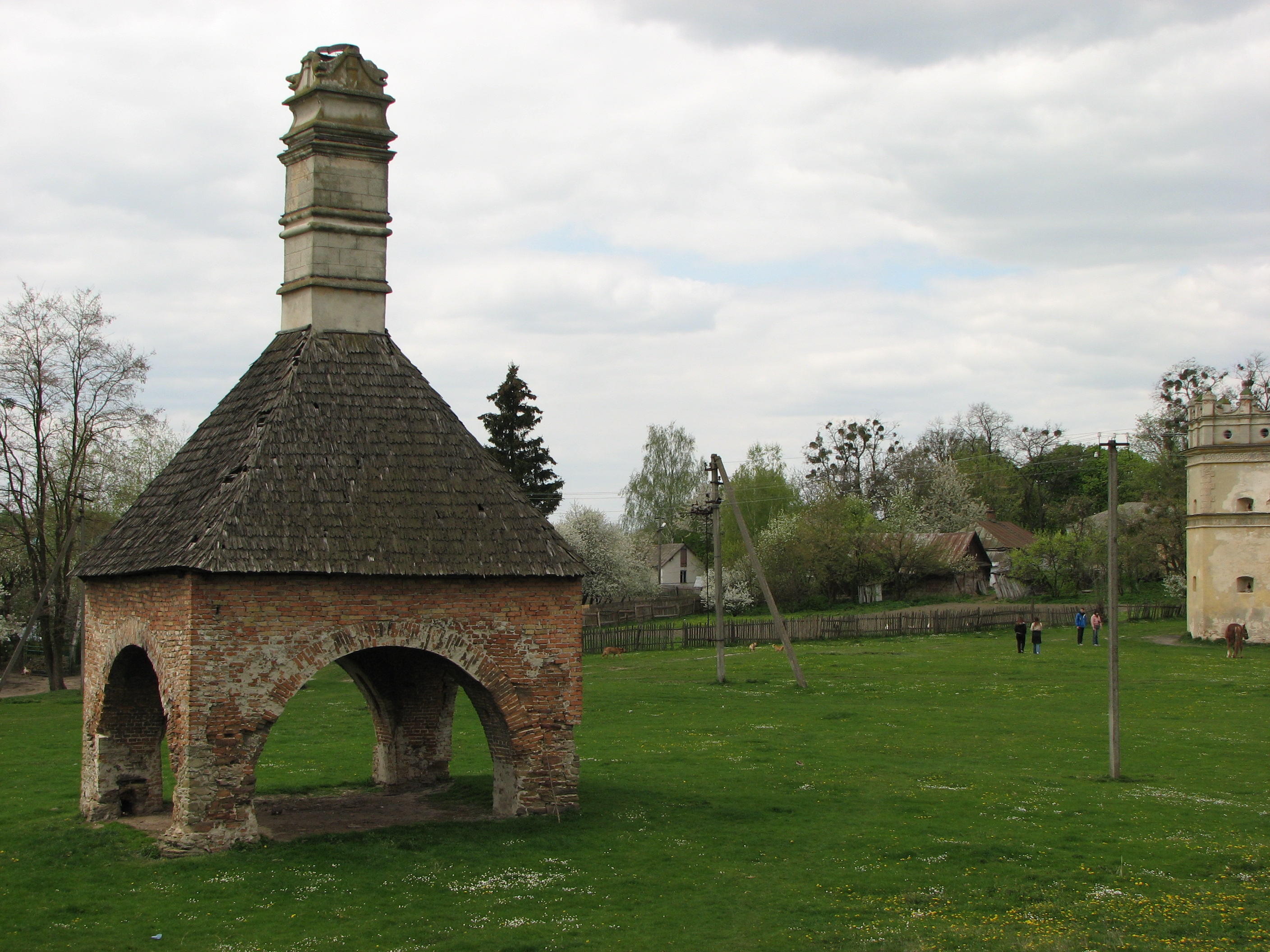 Острог. Межиріцька піч.